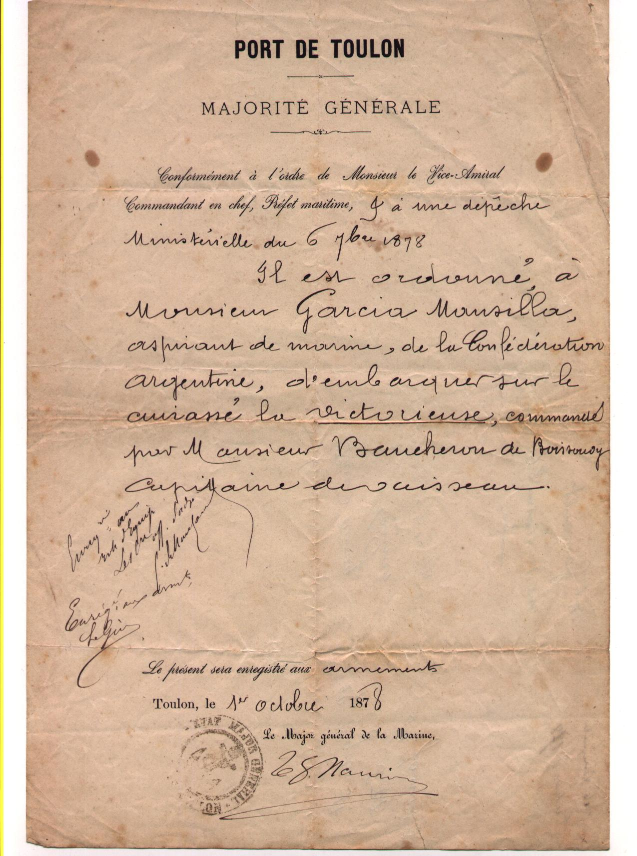 Informe de embarque para la fragata "La Victorieuse" luego del egreso como oficial de marina de la Escuela Naval de Brest de Manuel José García-Mansilla